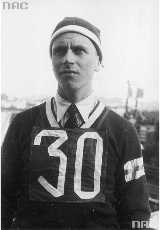 Le skieur finlandais Erkki Maekinen.